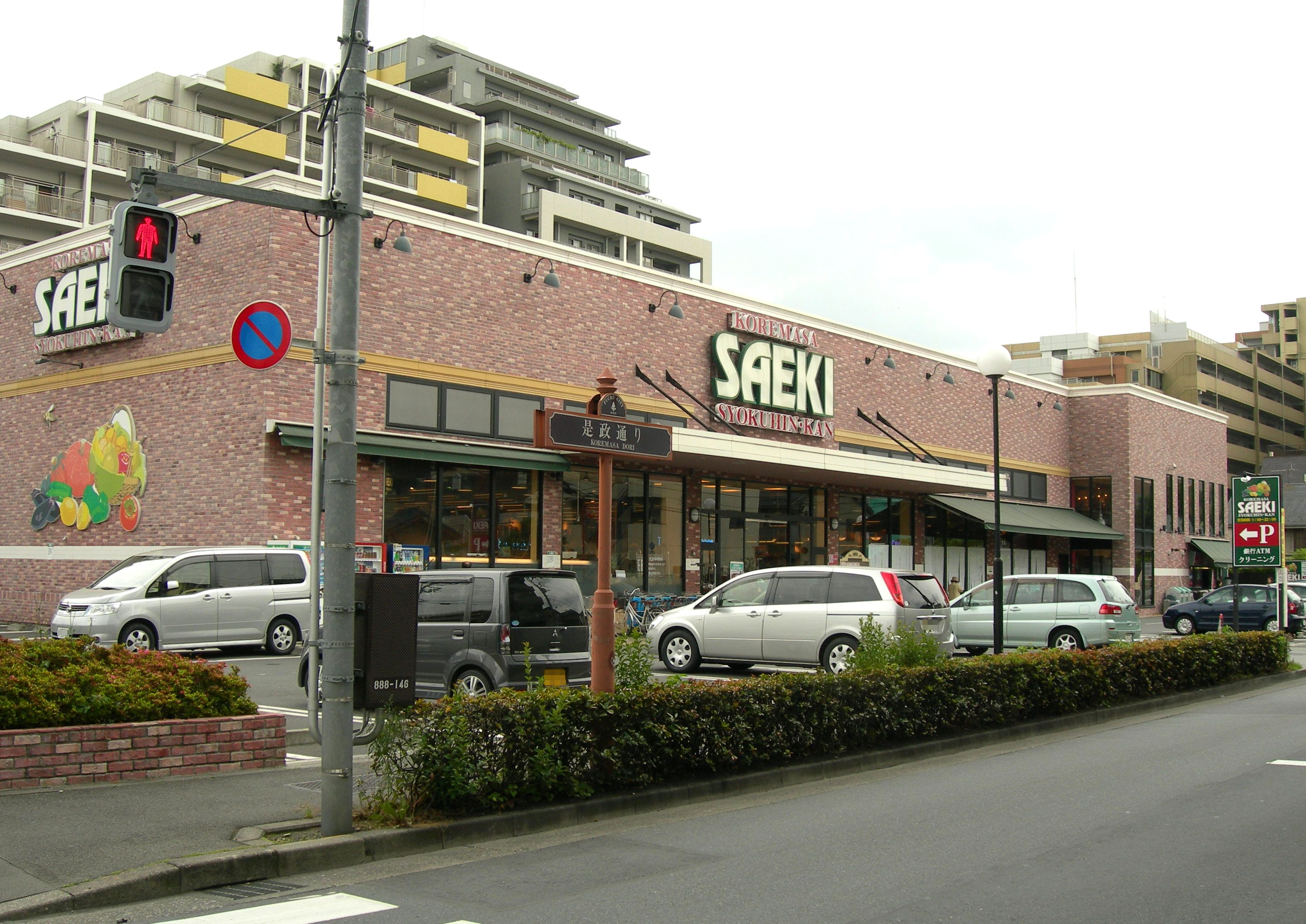 さえき是政食品館（東京都府中市）